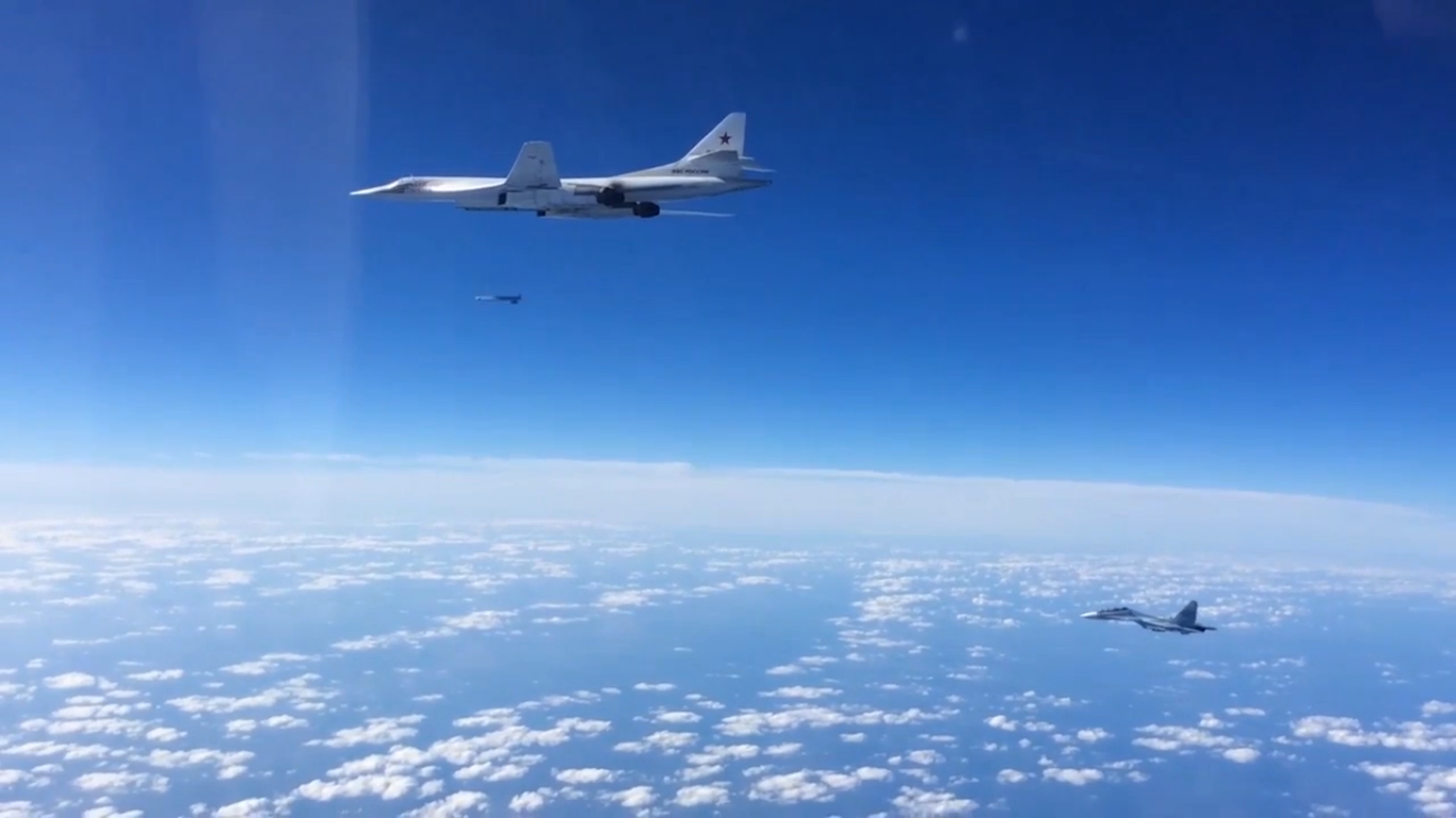 Un Su-30SM escortant un Tu-160 qui lance un missile de croisière au-dessus de la Méditerranée.